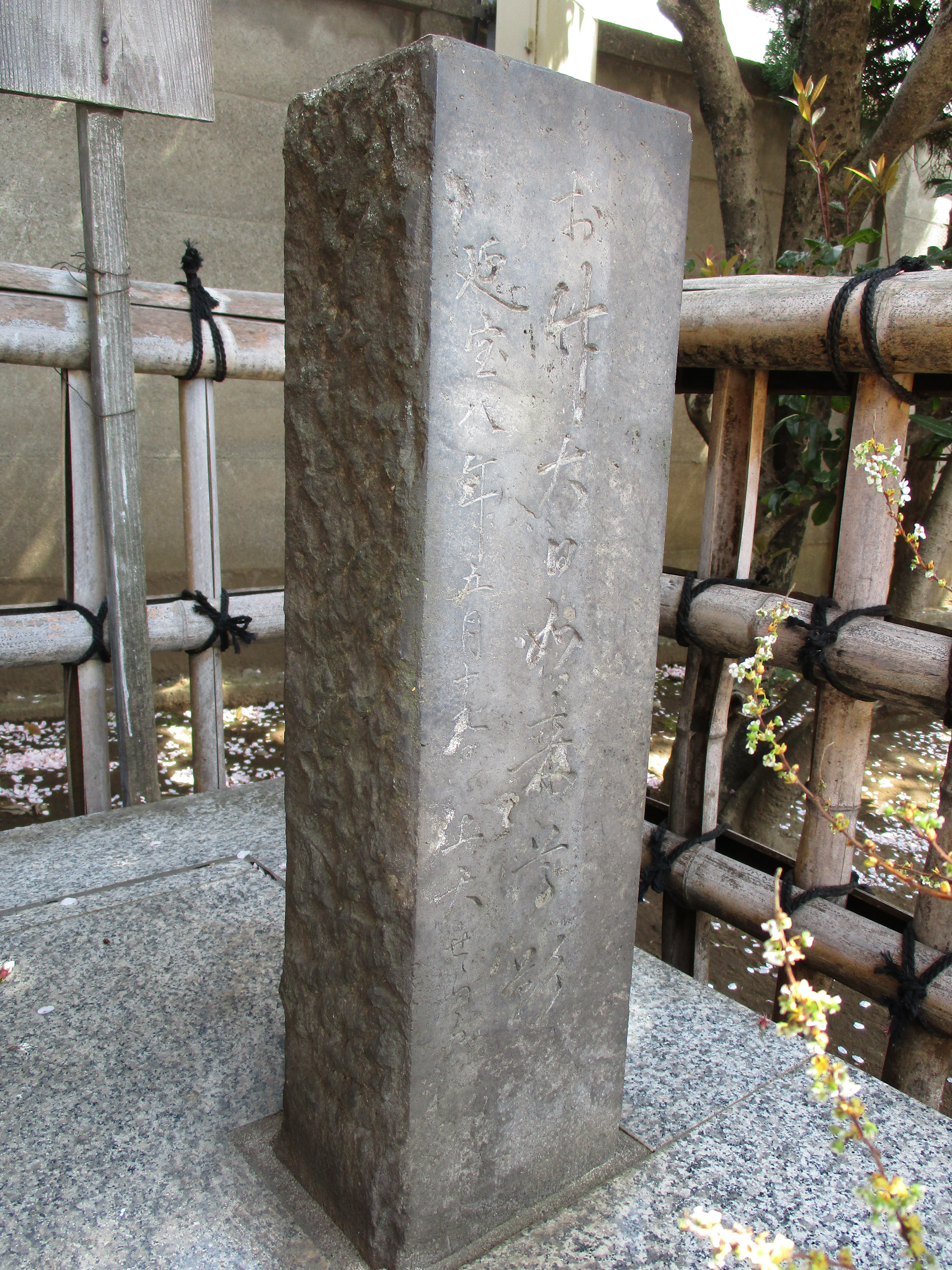 お竹の墓脇の石碑で没年が書かれている。